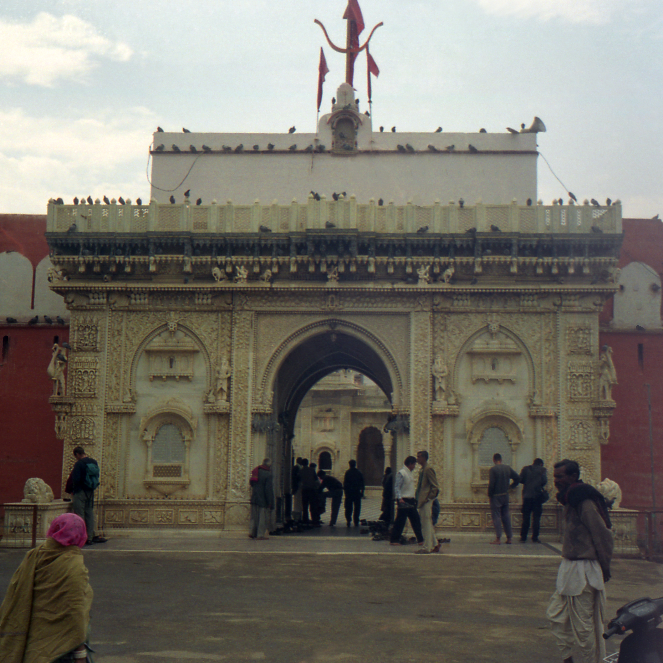 Karni Mata Temple (a.k.a. "Rat Temple"). Deshnoke, Rajasthan, India.